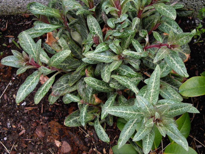 Lysimachia minoricensis